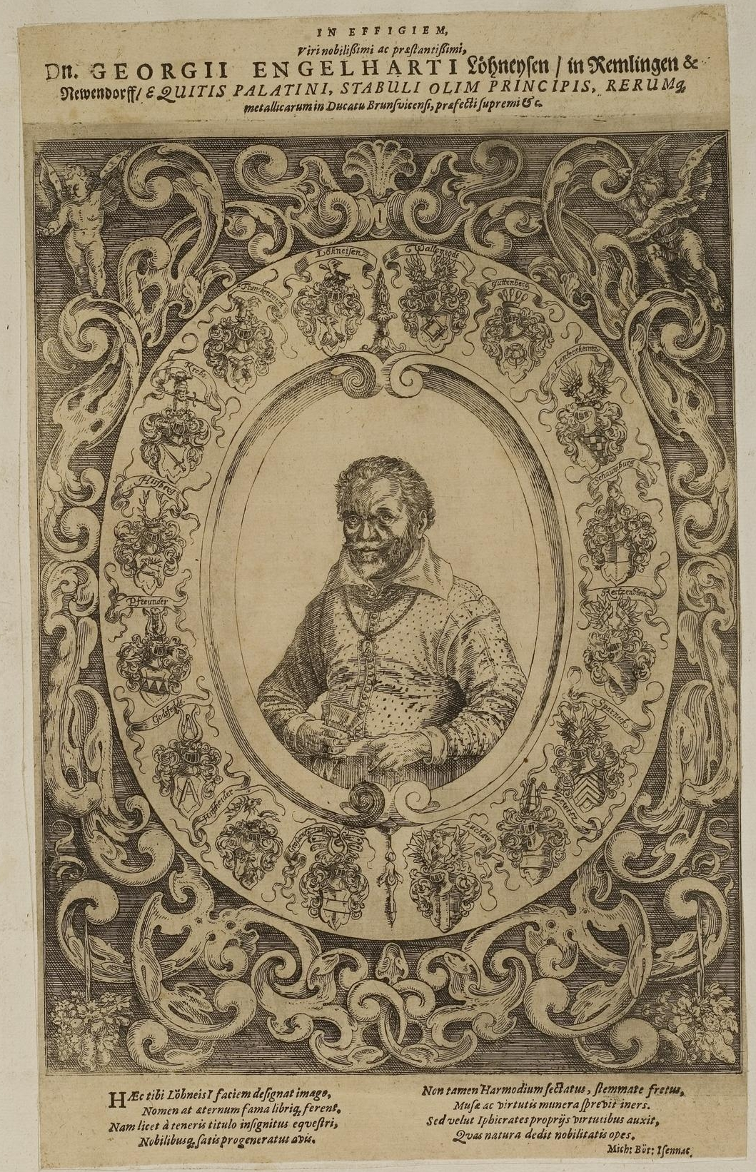 Grafik aus dem Klebeband Nr. 1 der Fürstlich Waldeckschen Hofbibliothek Arolsen Motiv: Georg Engelhard von Löhneysen (mit heraldischer Ahnenprobe)